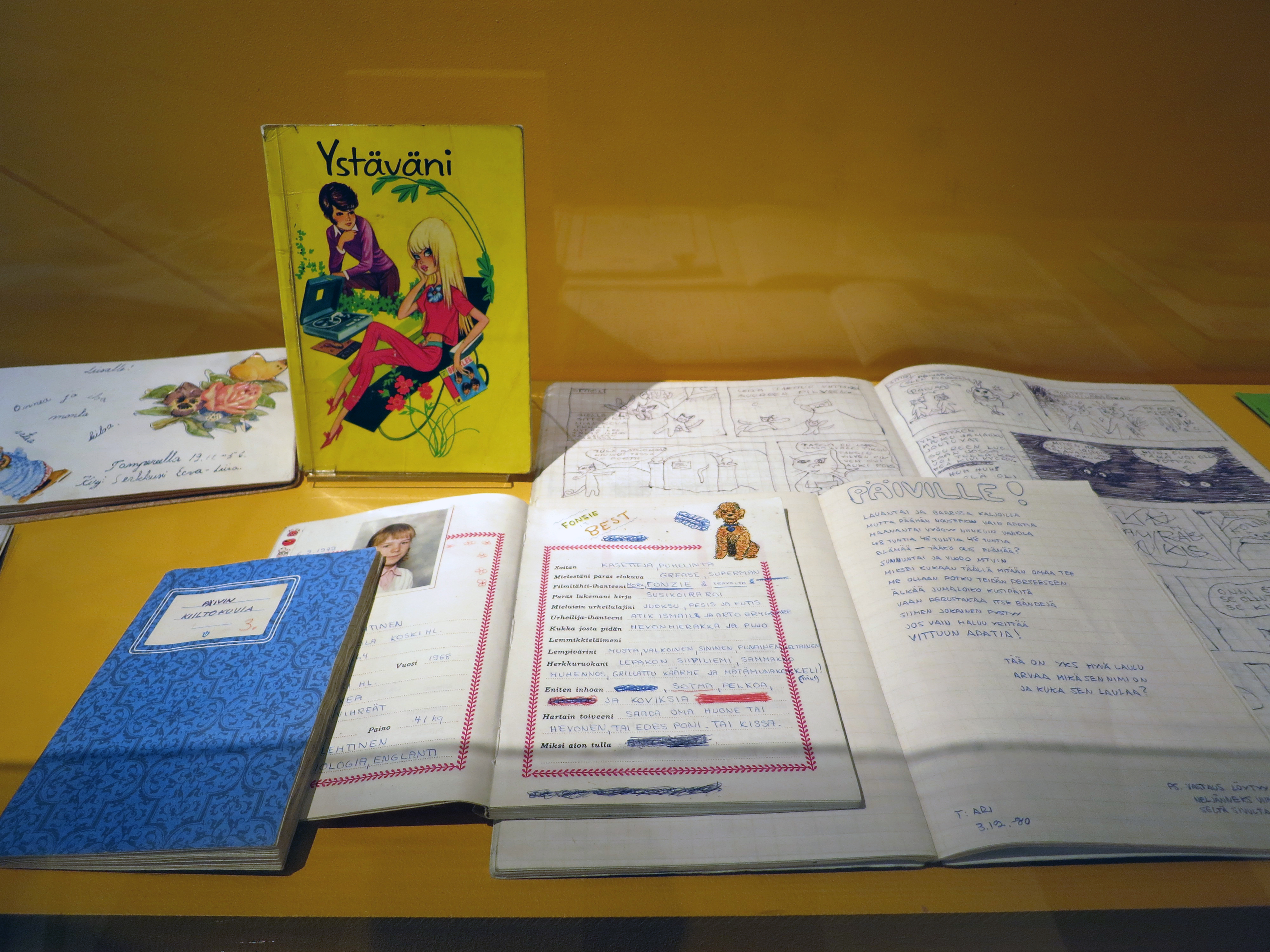 Kuvassa on niin sanottuja ystäväkirjoja, joihin etenkin kouluikäiset keräsivät ystäviensä tietoja. Tyypillisesti kirjaan piti täyttää esimerkiksi nimi, ikä, lempiruoka ja lempimusiikki. Kirjat kuvattu mediamuseo Rupriikissa Tampereella.